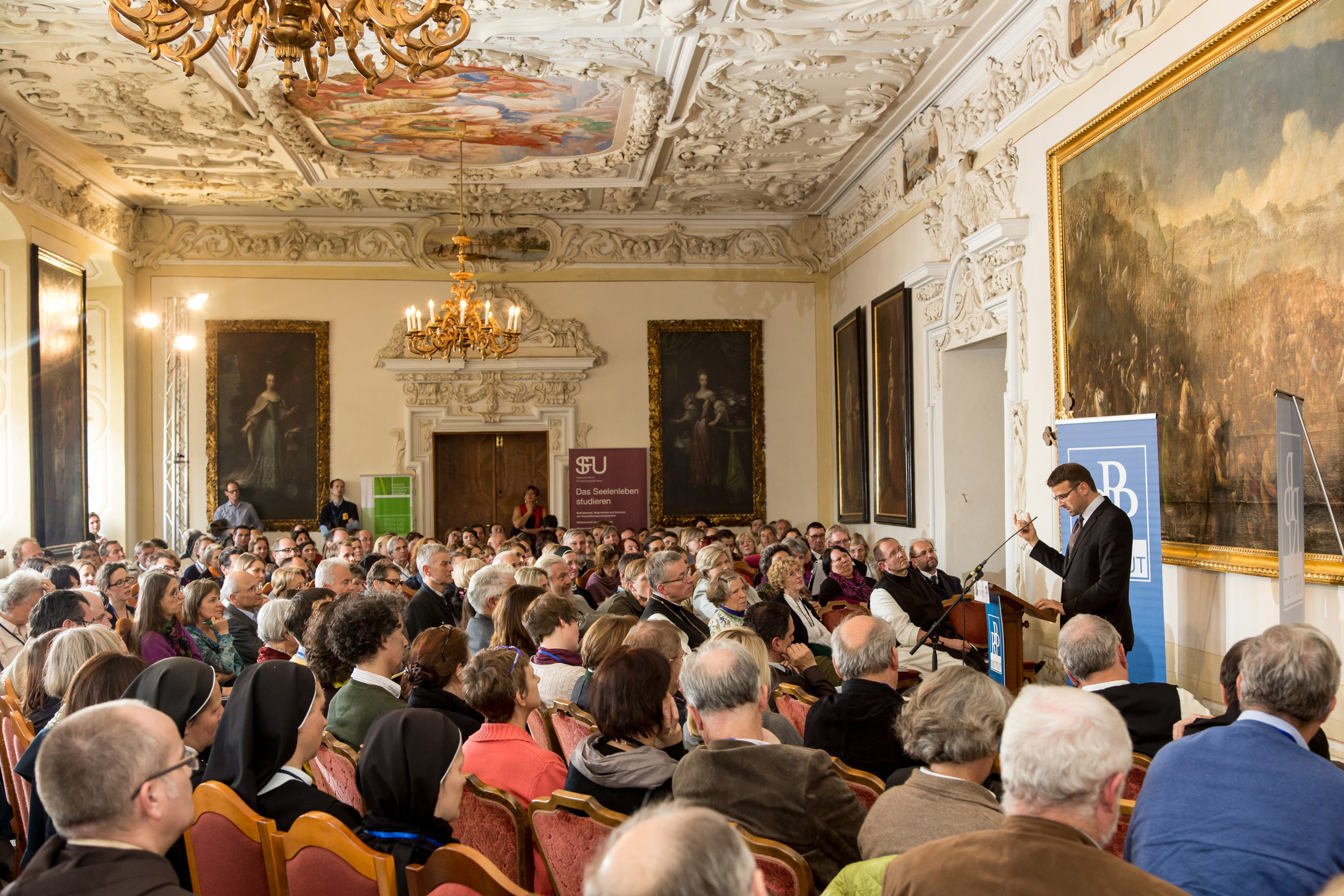 Fachtagung "Gottesfurcht & Heidenangst" im Stift Heiligenkreuz"